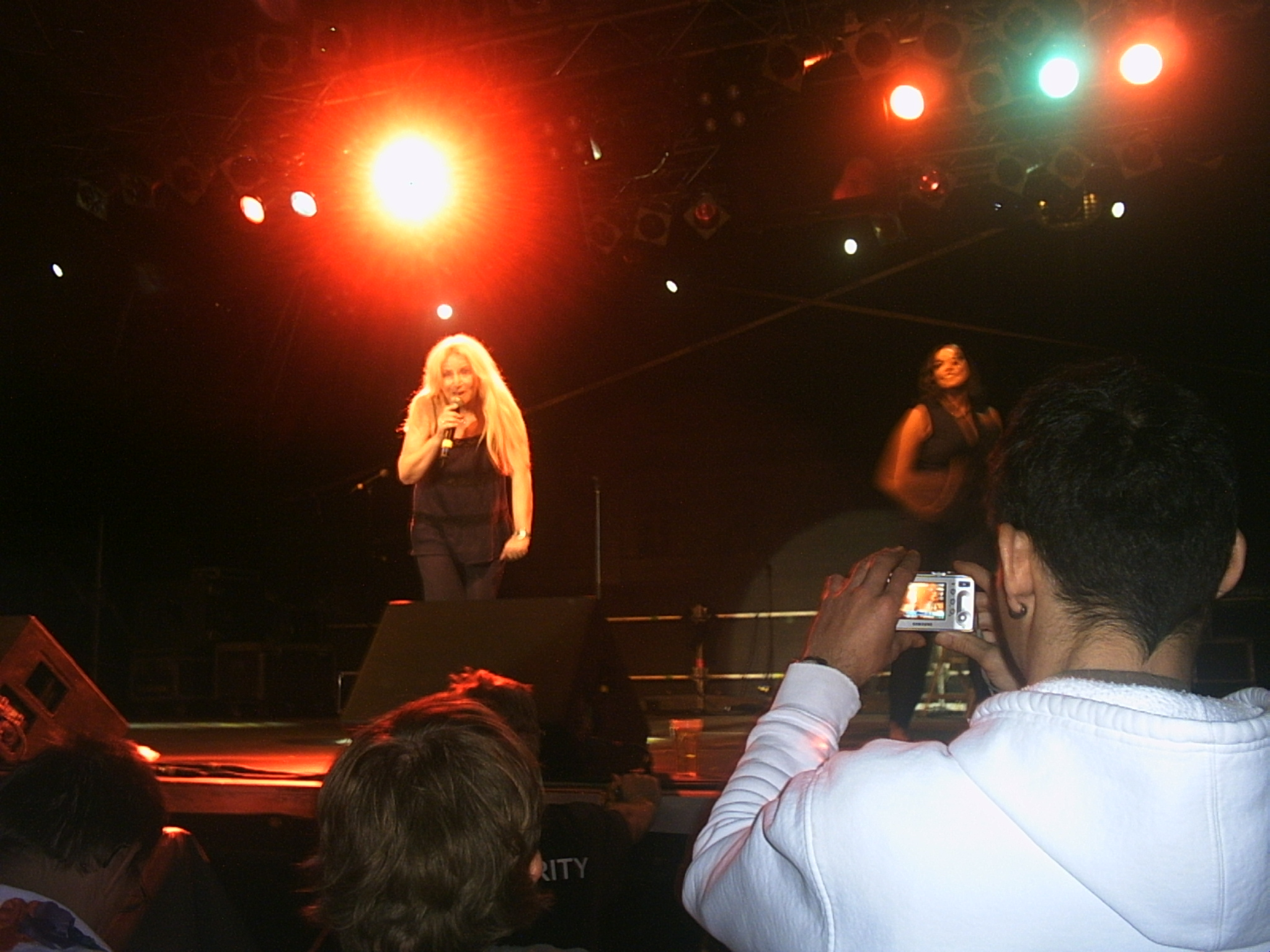 Pussycat auf dem Abschlusskonzert des Haldenslebener Altstadtfestes